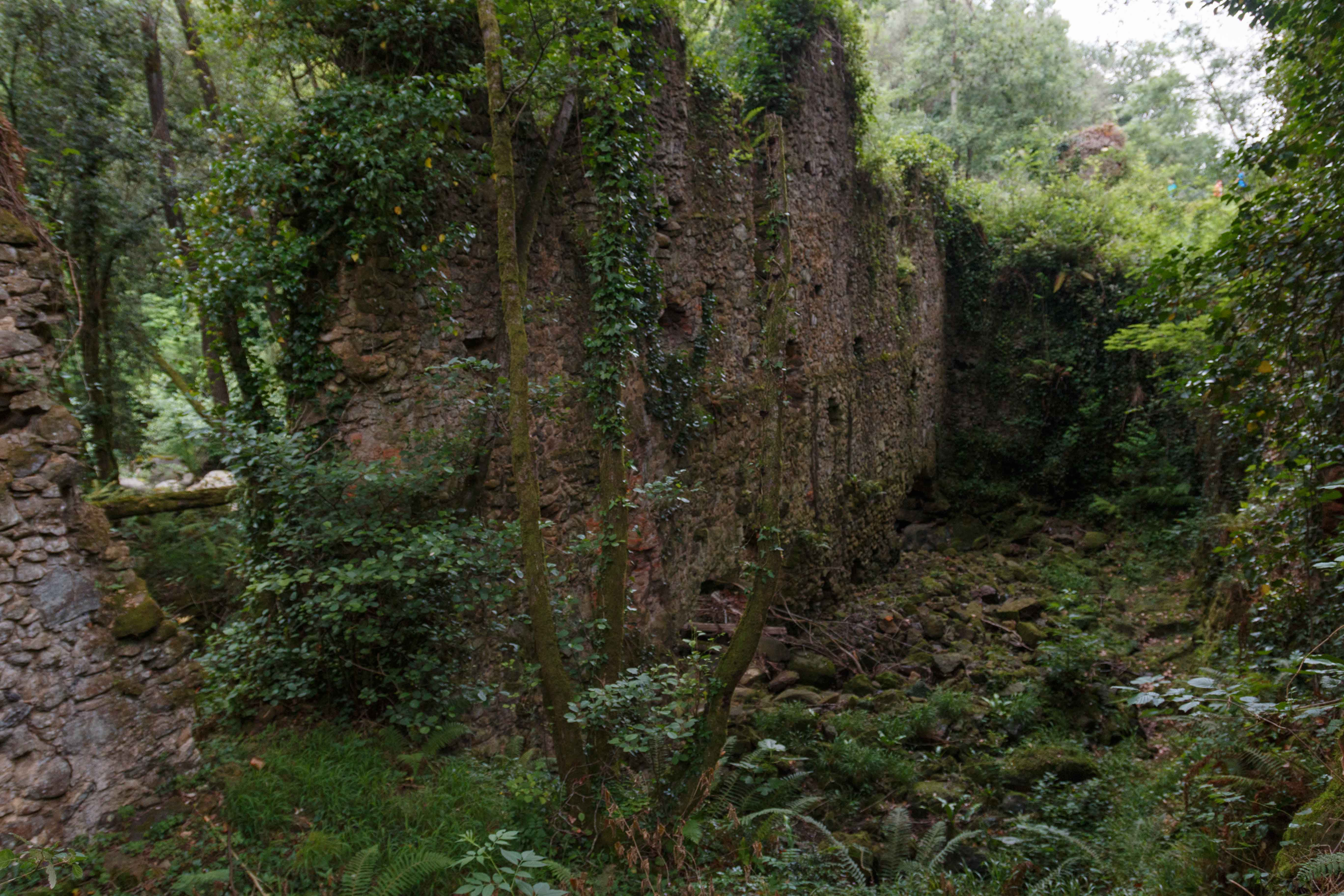 FERRERIA - MOLINO DE OLLA